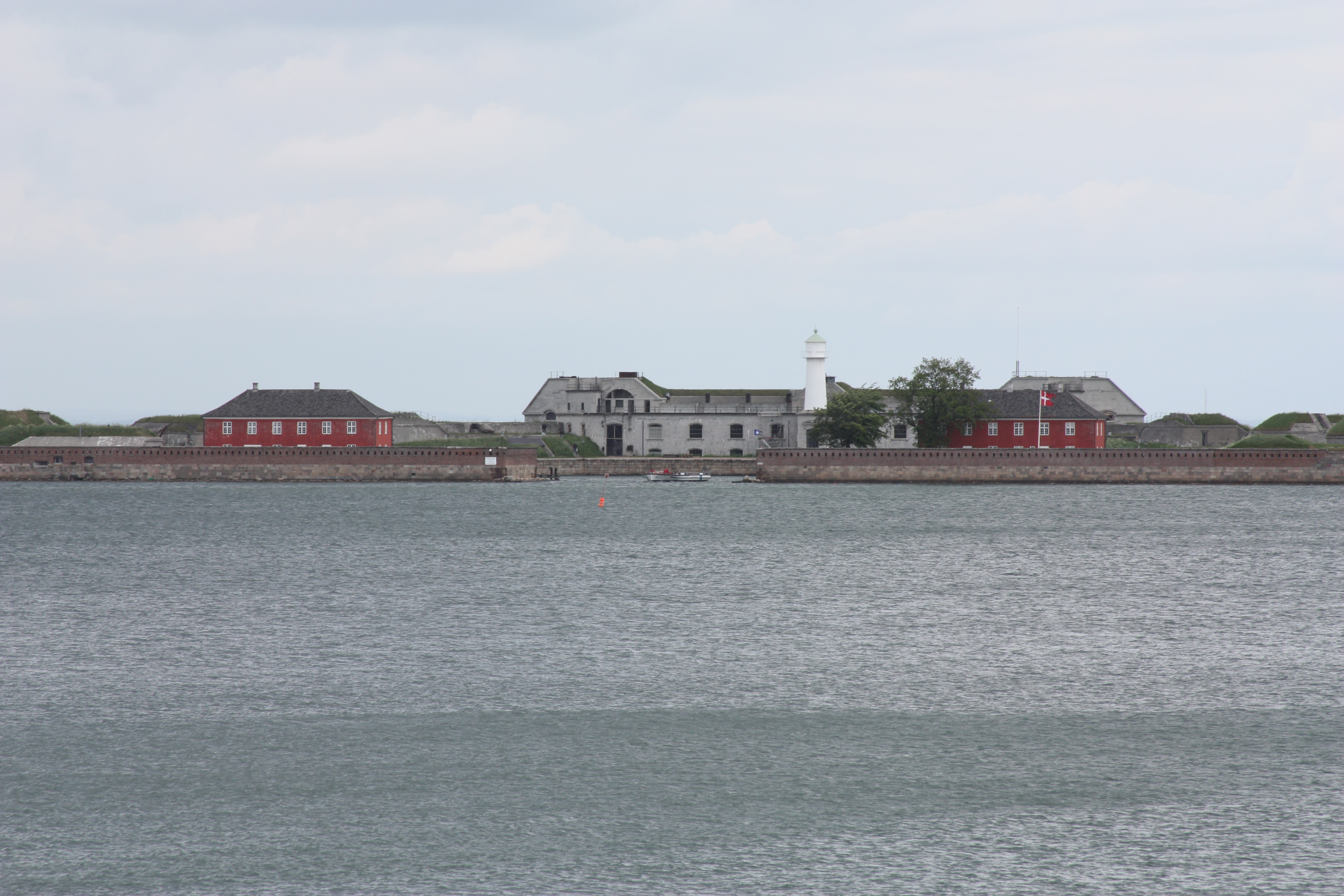 Trekroner Fort in Kopenhagen 2009